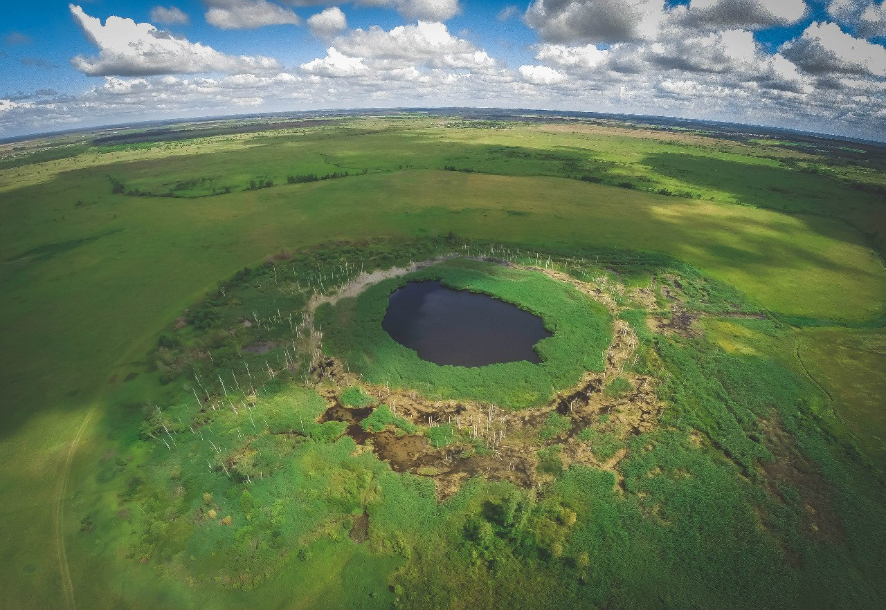 Топоровское озеро, Можайский район, МО